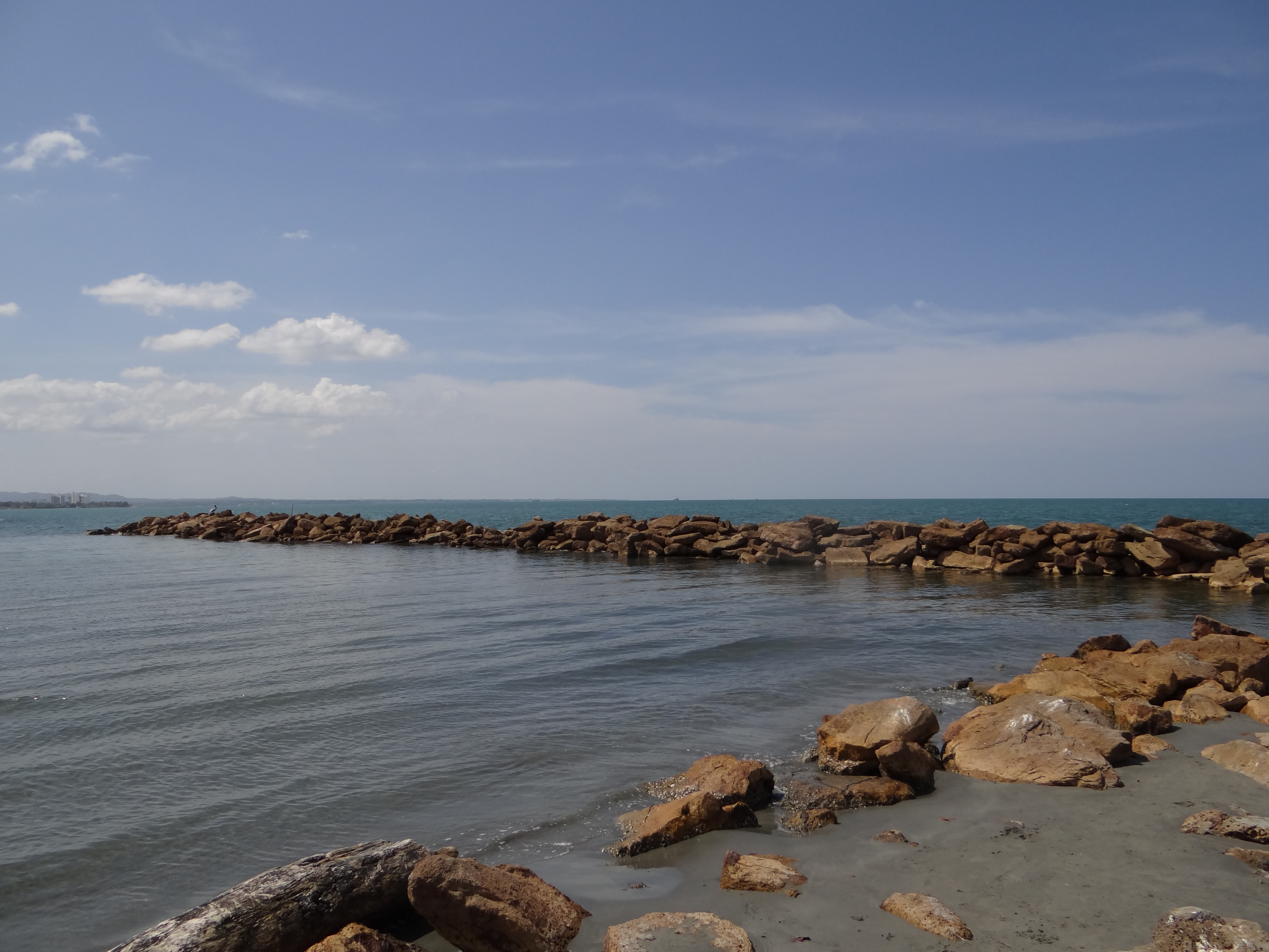 Una de varias ensenadas de las playas de Coveñas